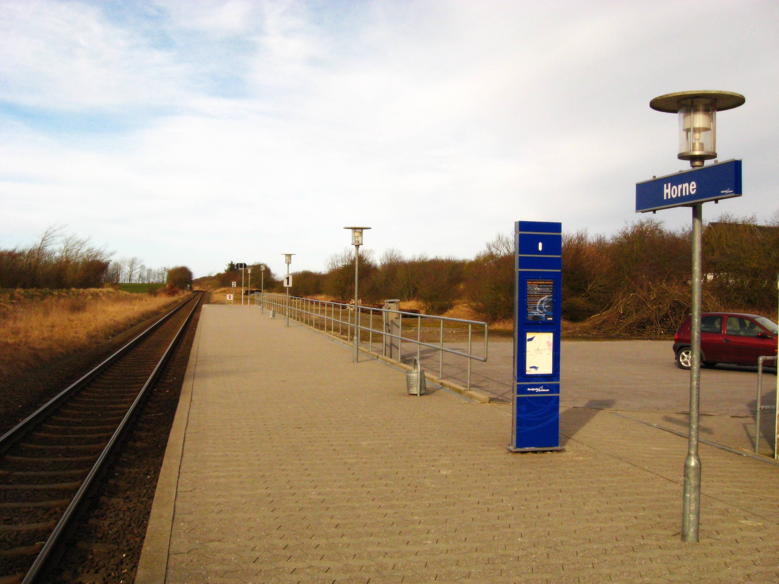 Horne Station er en dansk jernbanestation i Horne, syd for Hirtshals, mellem Tornby Station og Emmersbæk Trinbræt.